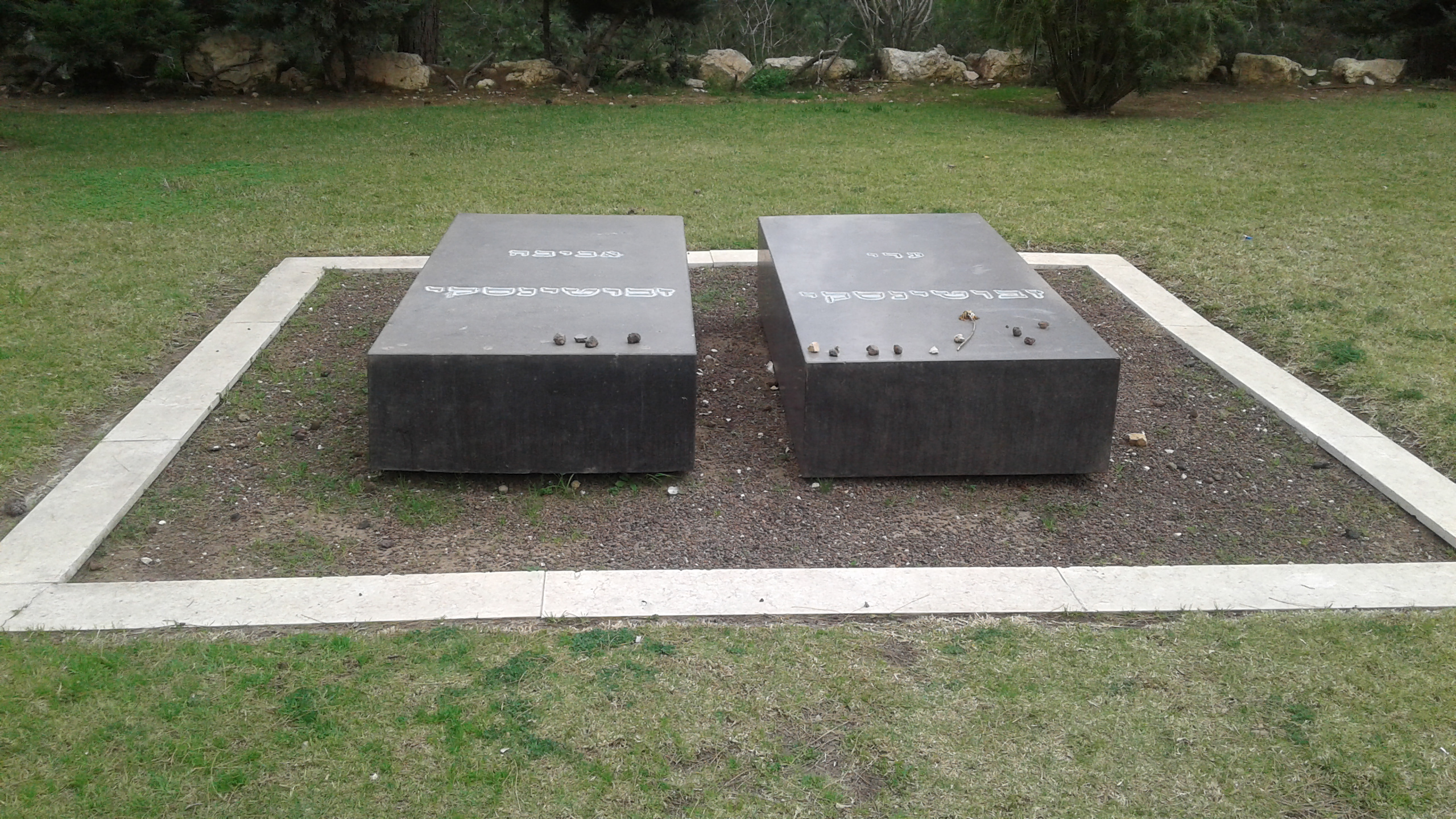 קברם של ערי ז'בוטינסקי ואשתו בהר הרצל